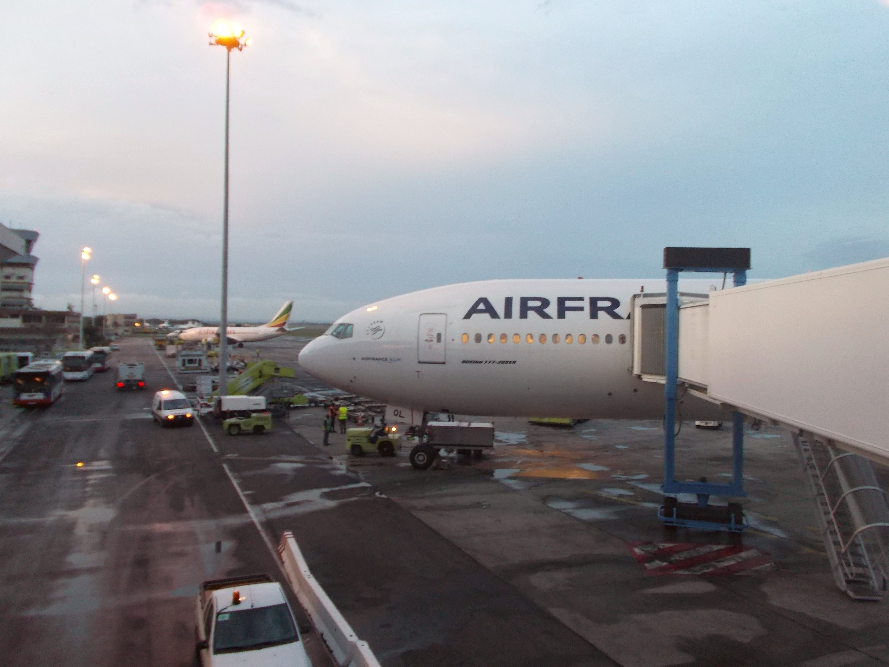 Abidjan Félix Houphouët-Boigny